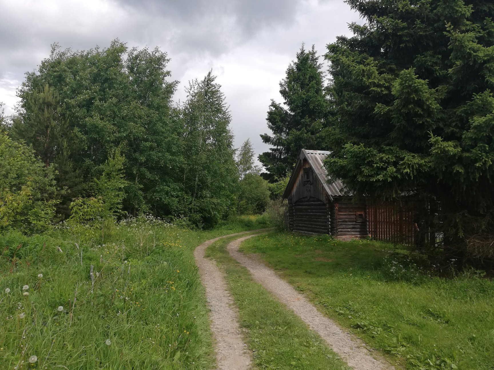 Деревня Чертовищи, дорога к картофельным полям